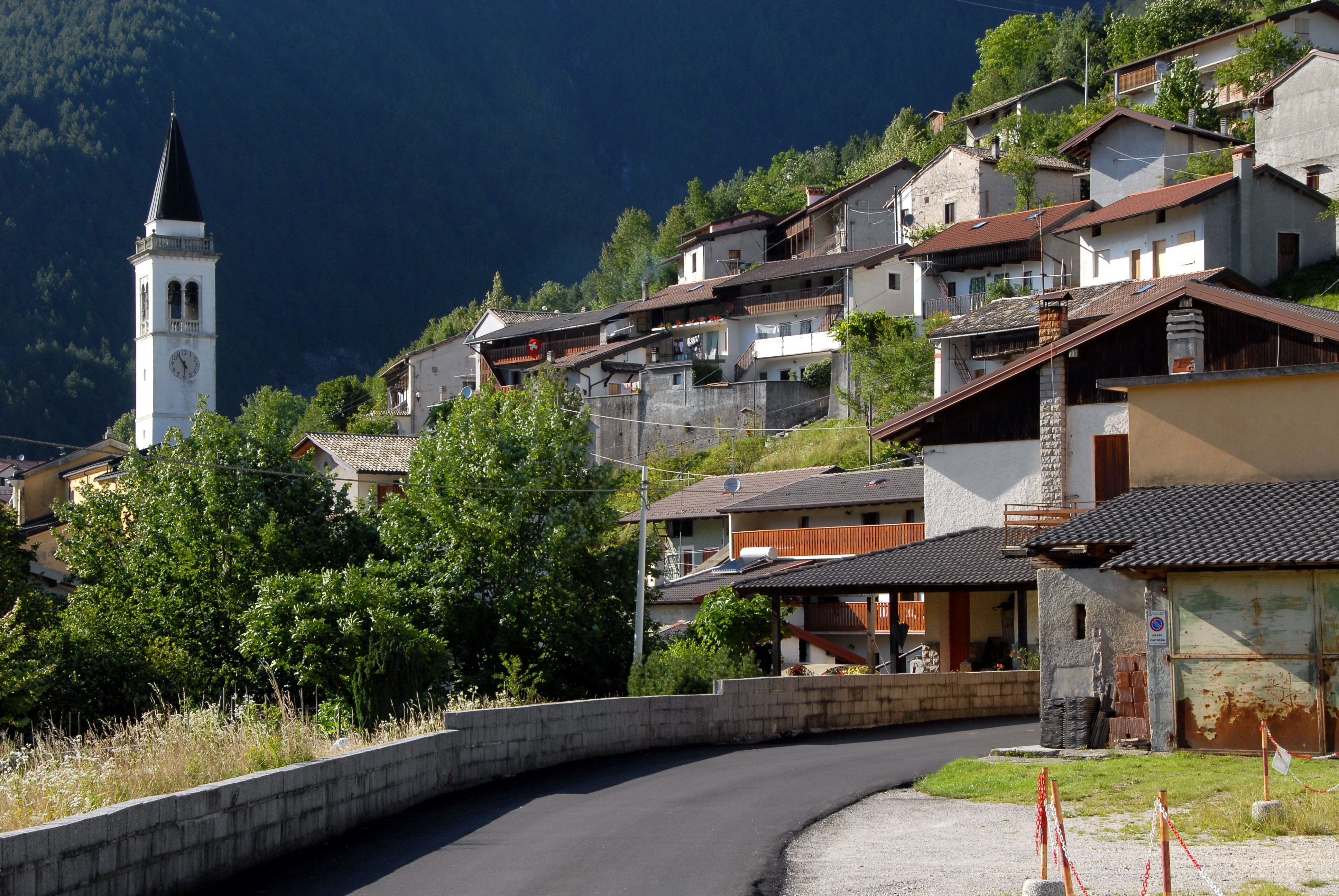 Stolvizza in the Resia valley of Friuli Venezia-Giulia, Italy